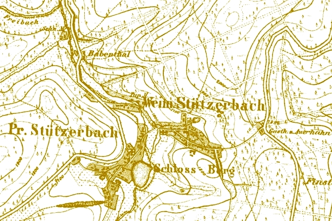 Histor. Messtischblatt mit der Ortslage Stützerbach.